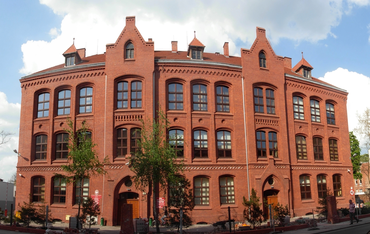 Budynek w gestii Collegium Medicum UMK w Bydgoszczy, dawniej Johannisschule, ul. Świętojańska 20 (1887-1888, Carl Meyer)